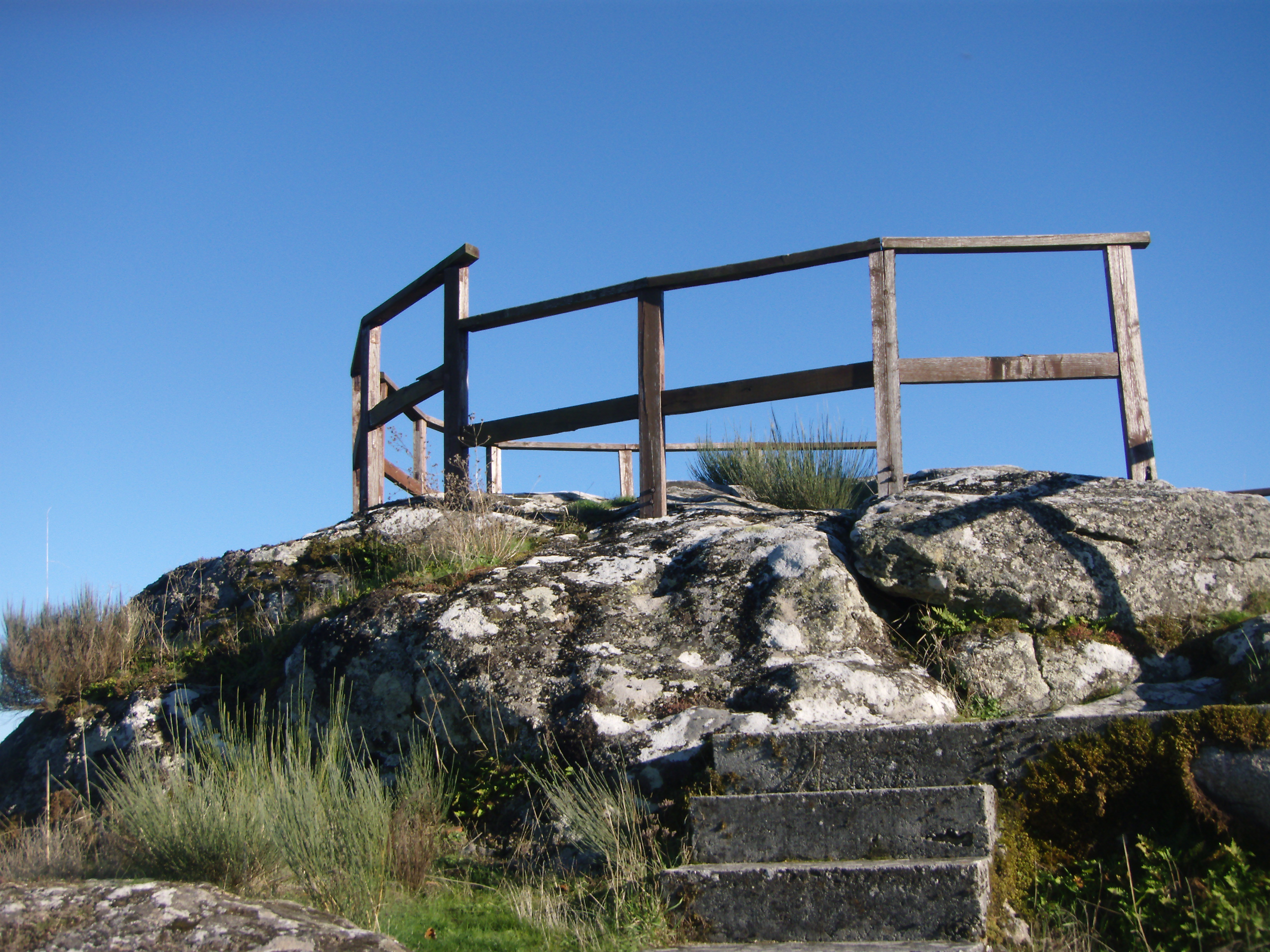 mirador